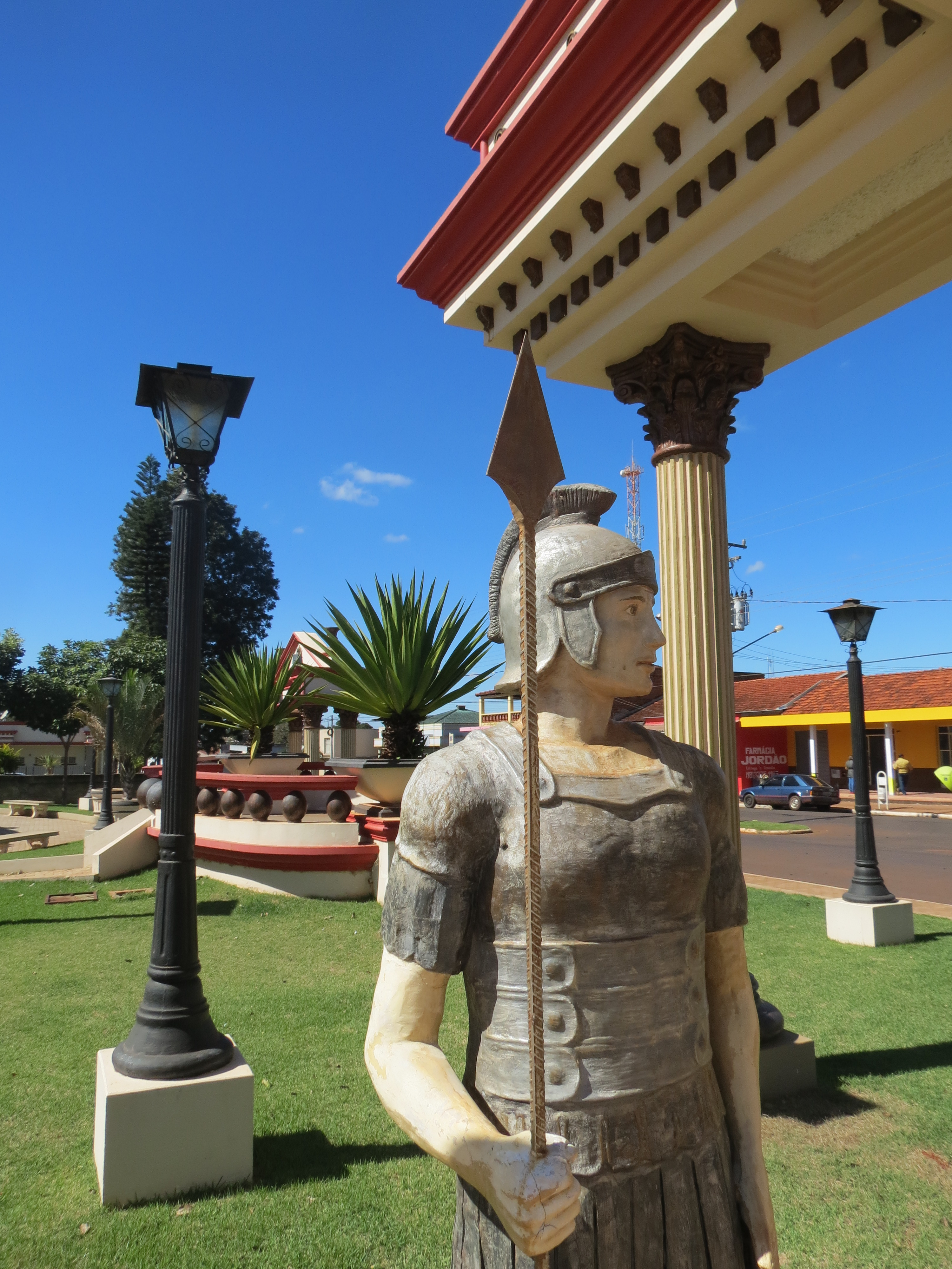 Pedrinhas Paulista 2013-07-26 Visita a Cidade (5)